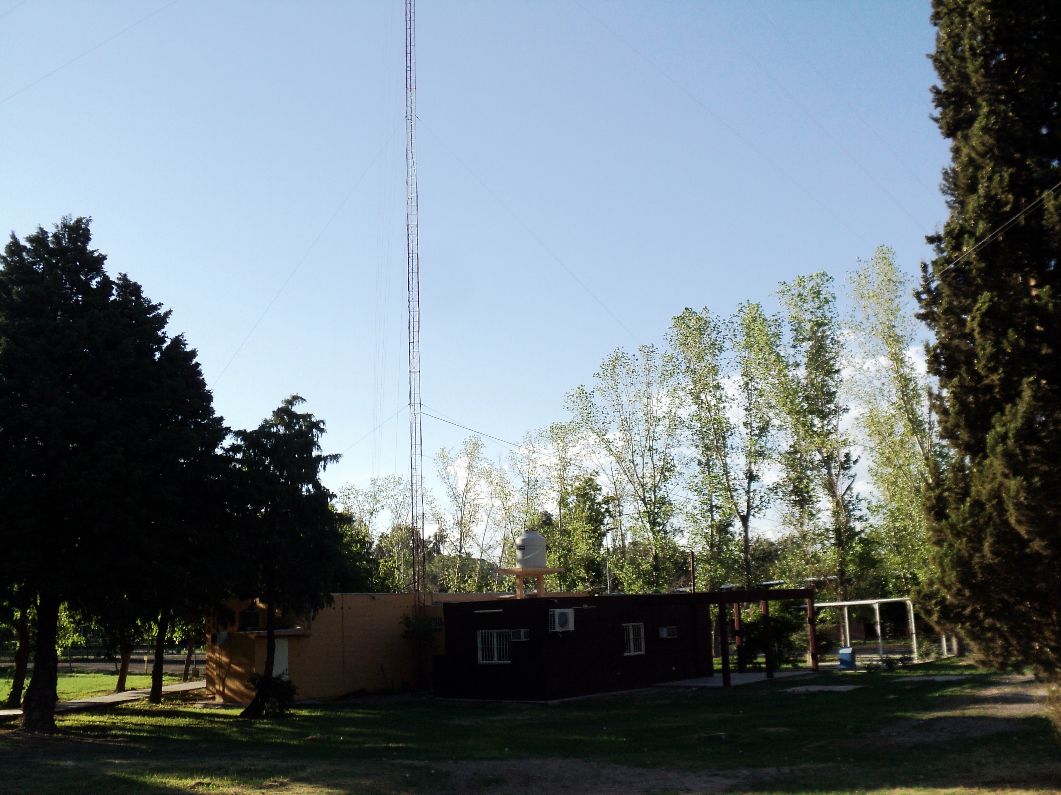 EL EDIFICO DE LA RADIO